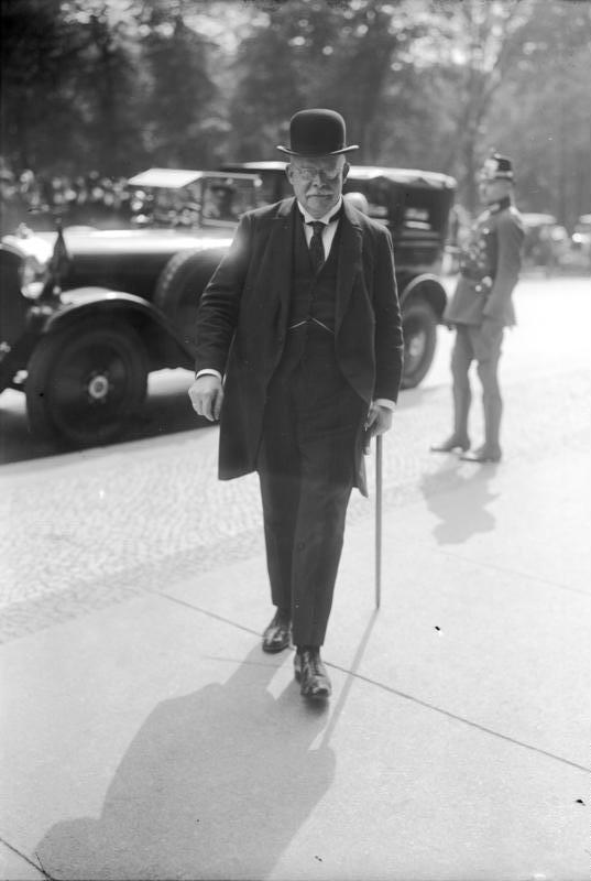 Interessante Politiker auf dem Wege zum neuen Reichstag! Der Führer des Zentrums , der ehemalige Reichskanzler Dr. Marx auf dem Wege zum neuen Reichstag.